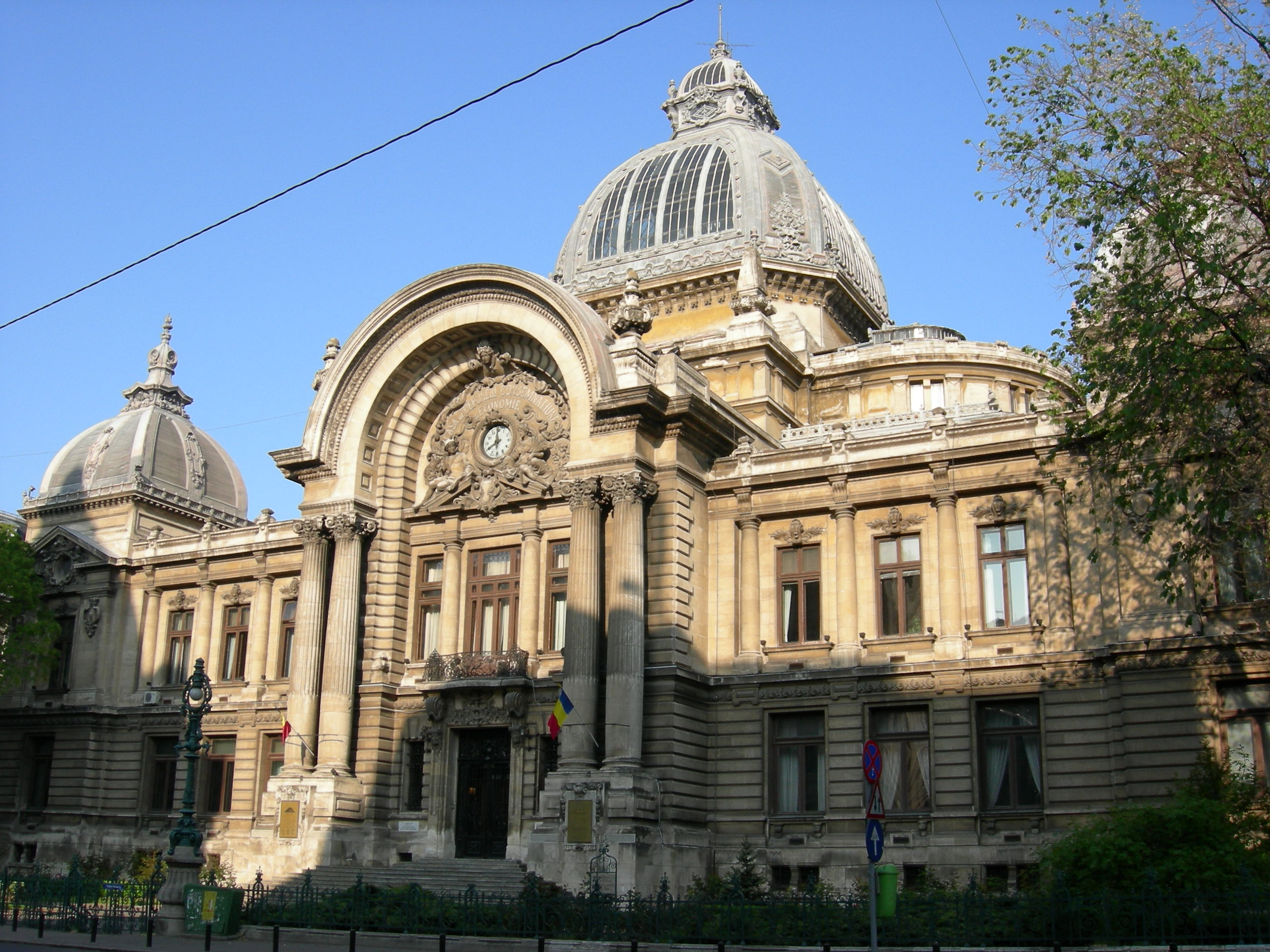 CEC (Casa de Economii şi Consemnatiuni) Building, Calea Victoriei, Bucharest, Romania